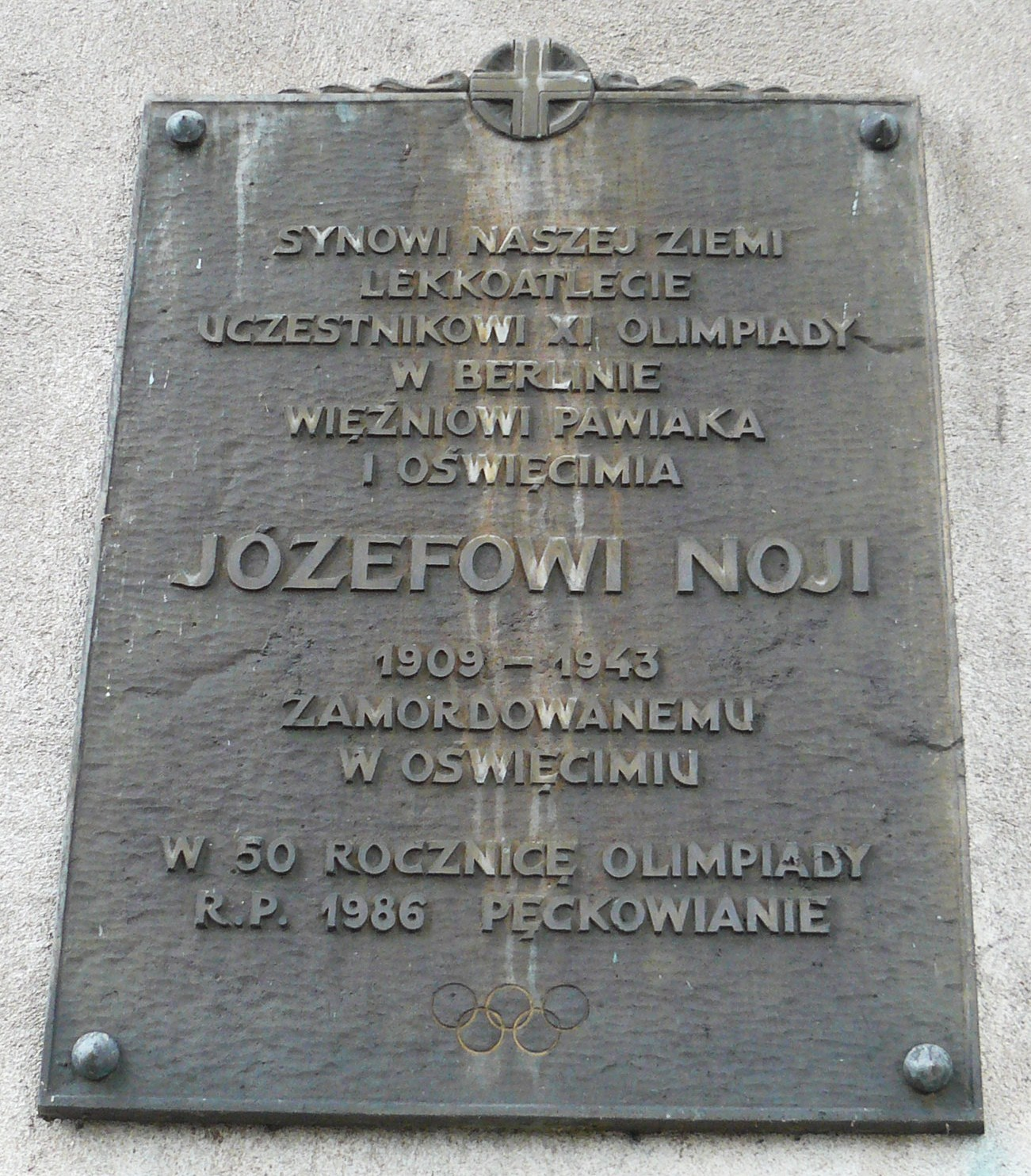 Pęckowo, ul. Powstańców Wielkopolskich 6 - kościół pw. św. Ignacego Loyoli